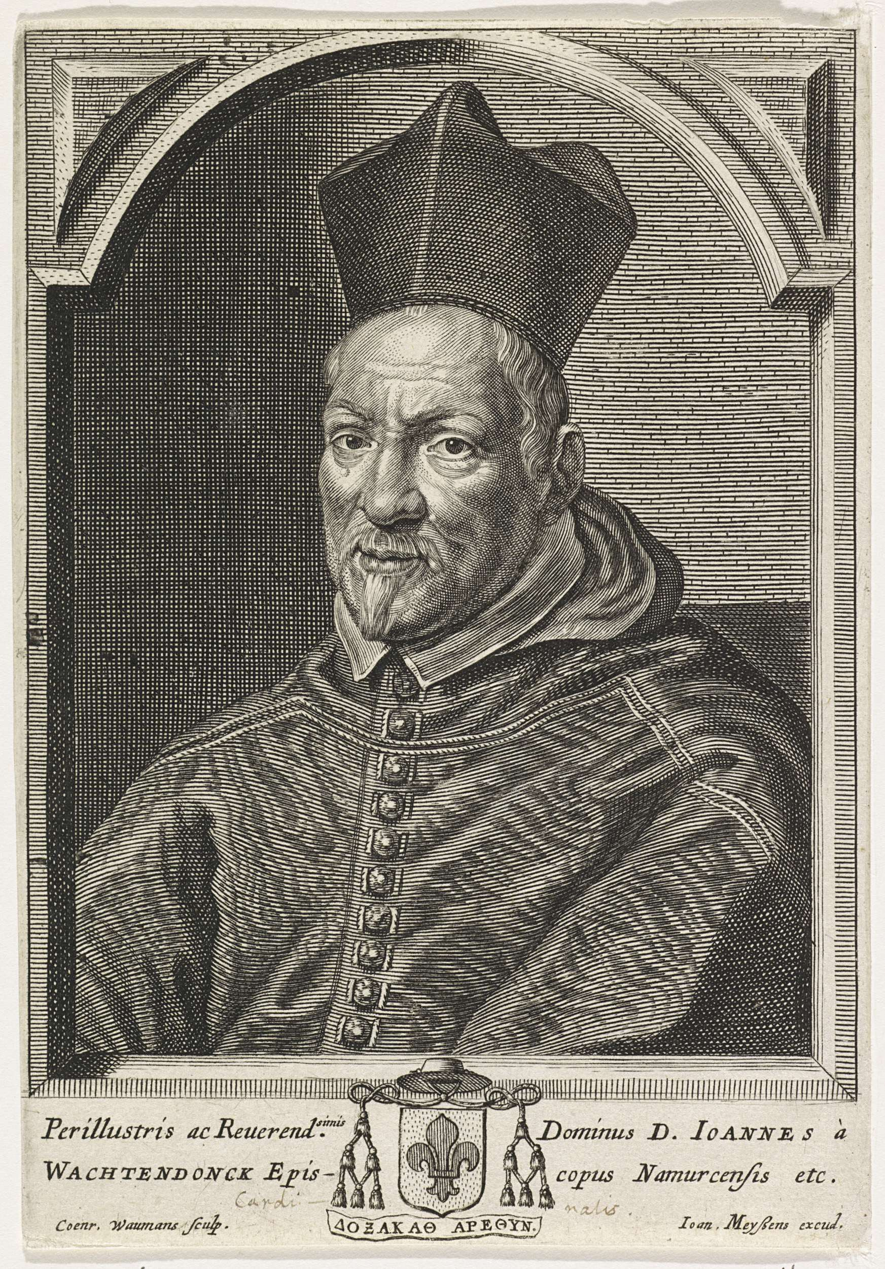 Portret van Johannes Wachtendonck, bisschop van Namen, met biretta op het hoofd. In de marge zijn wapen en een tweeregelig onderschrift in het Latijn. gravure, oorspr. afm. 170 x 118 mm. prentmaker: Coenraet Waumans (vermeld op object) (Antwerpen 19-jun-1619 - na 1652) uitgever: Joannes Meyssens (vermeld op object) (Brussel 17-mei-1612 - Antwerpen 18-sep-1670)